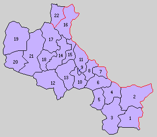 京都府天田郡の町村制時点の町村。